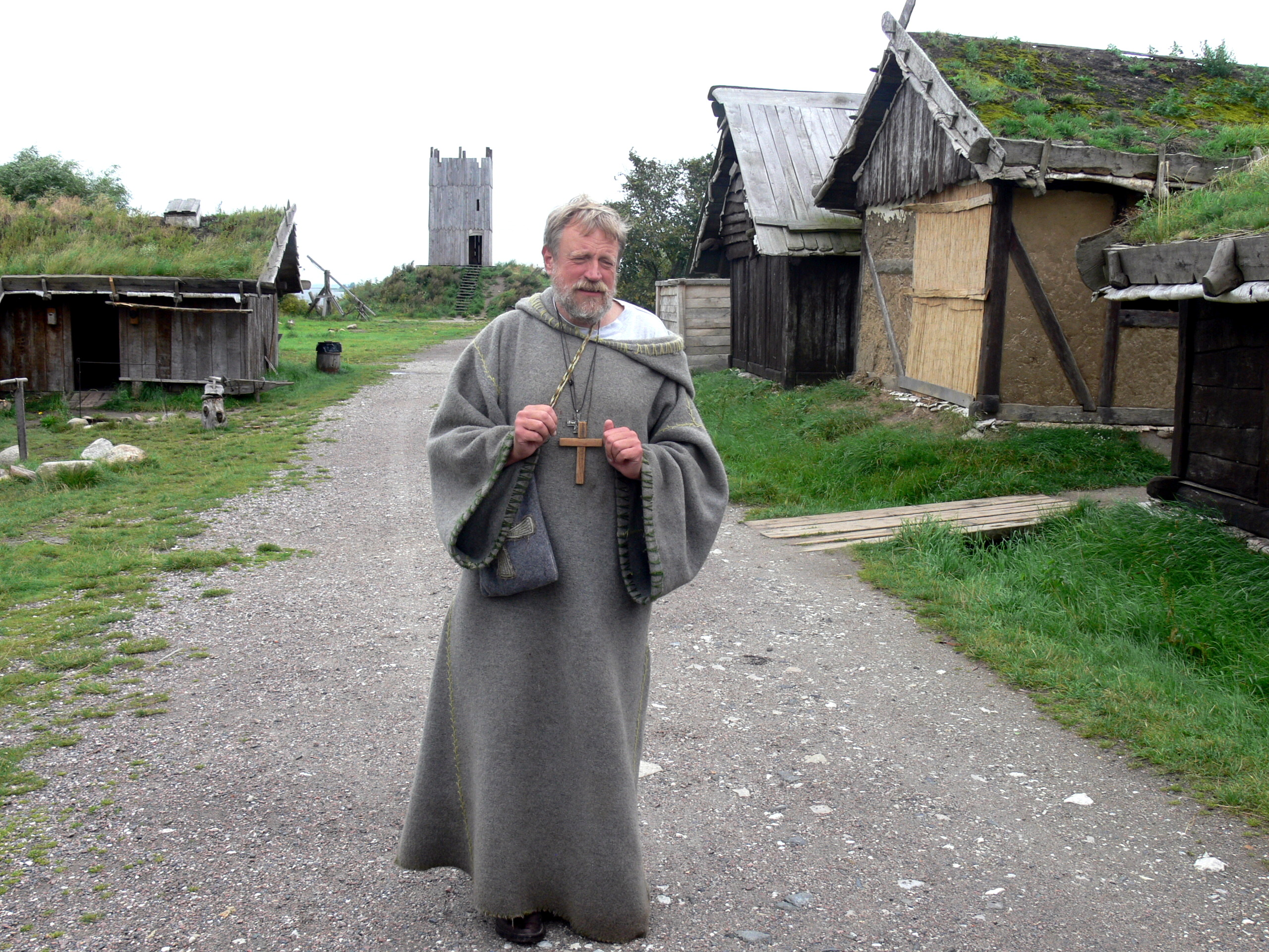 Wikingermuseum Foteviken auf Skanör. Mönch ( Guide ) auf der Hauptstraße der Siedlung